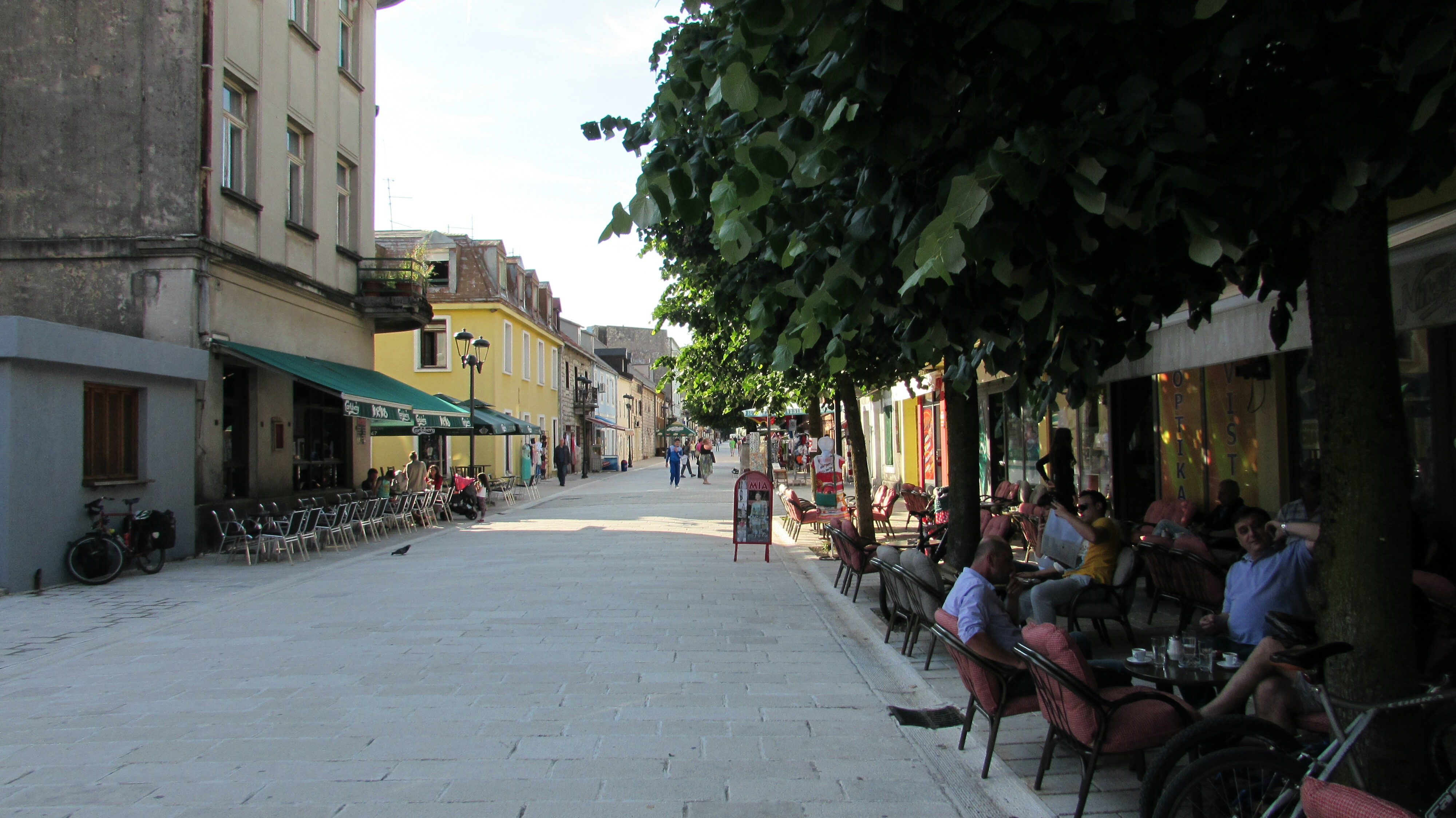 Cetinje2014